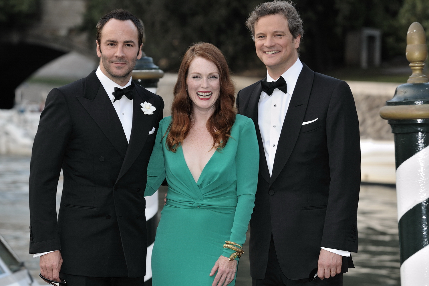 66ème Festival du Cinéma de Venise (Mostra), 10ème jour (11/09/2009) Arrivée au Lido de Colin Firth, Julianne Moore, Matthew Goode et le réalisateur Tom Ford pour le film : A sigle Man